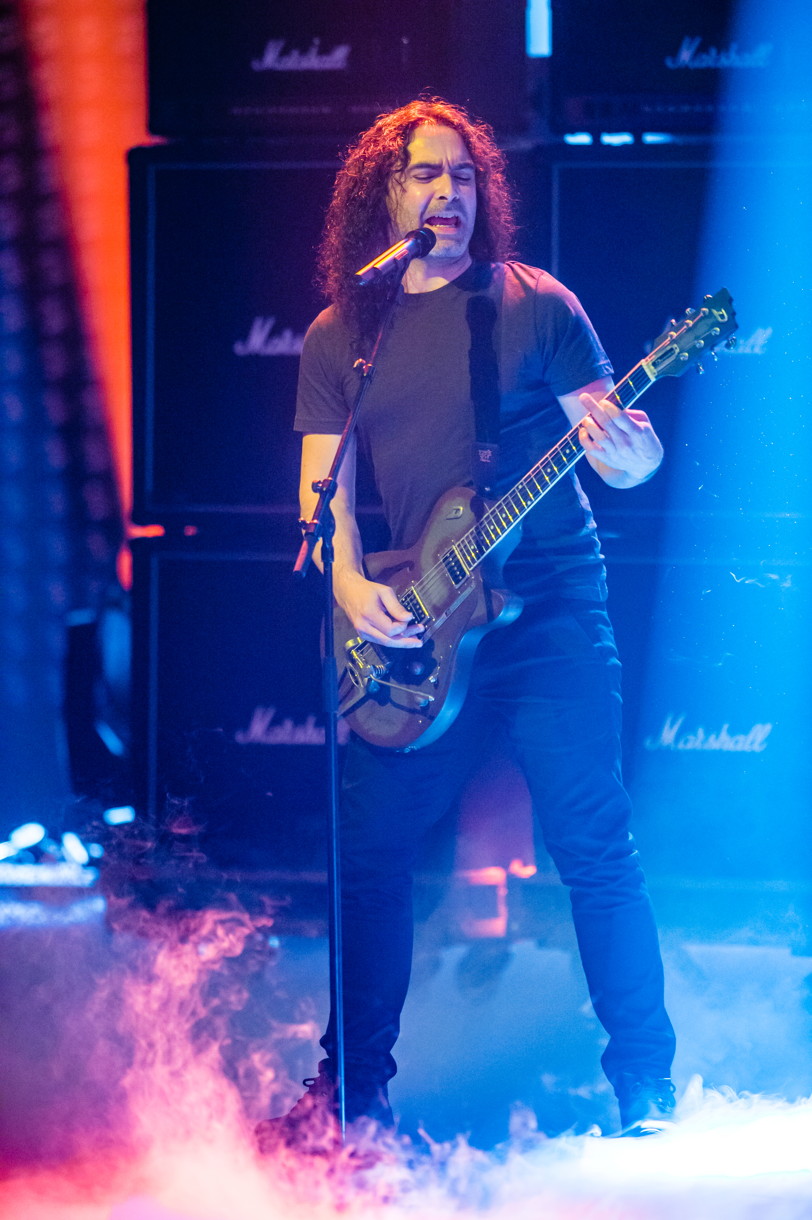 Eurovision Song Contest 2016 - Unser Lied für Stockholm - Avantasia